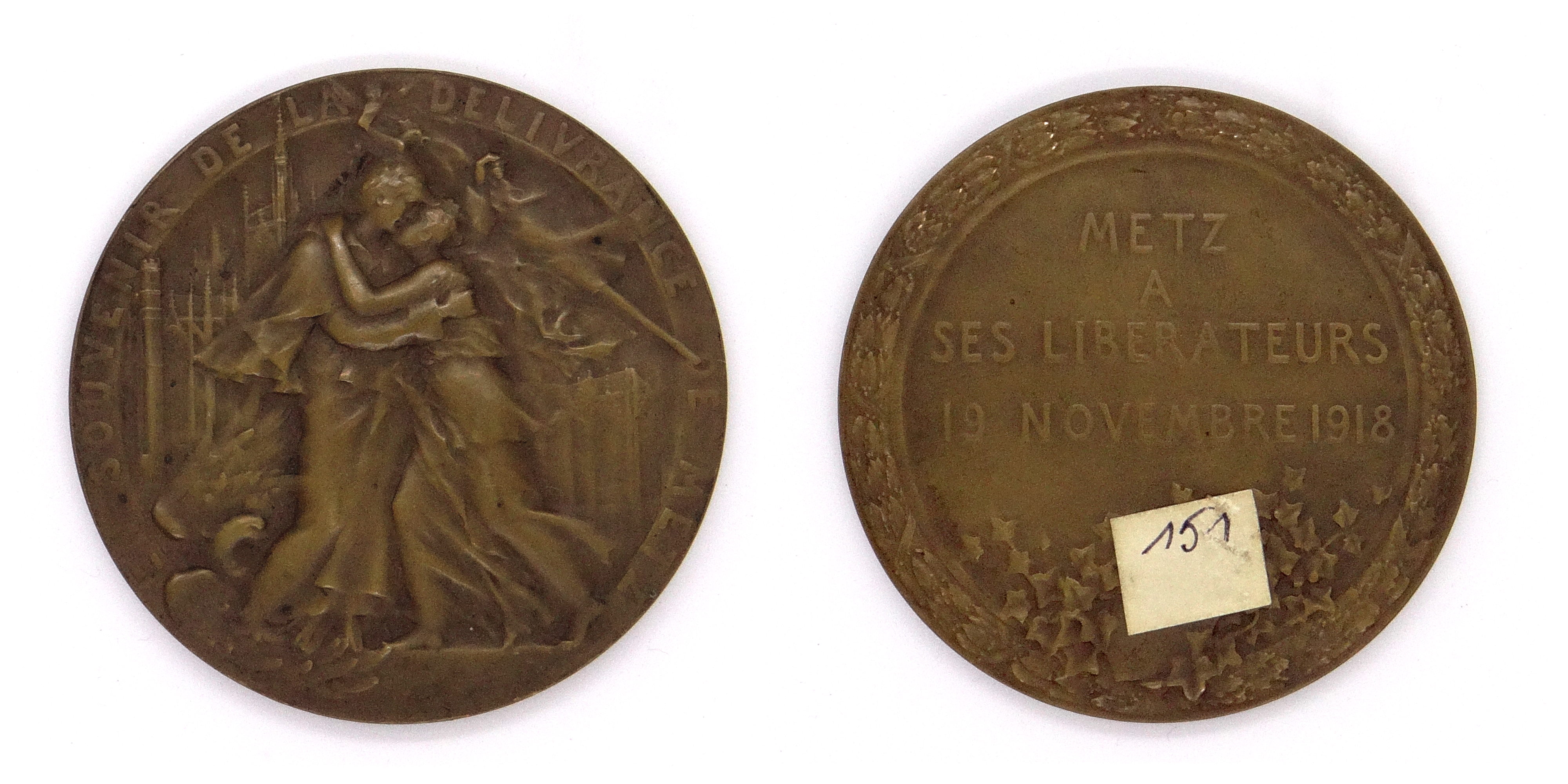 Avers : légende "En souvenir de la délivrance de Metz". La France debout à droite tenant de la main gauche un drapeau serré dans les bras de la ville de Metz. À terre l'aigle allemand, à l'arrière plan la cathédrale de Metz. Revers : légende "Metz à ses libérateurs". Une couronne de chêne, en bas un écu de Metz sur des branches de lierre. Étiquette collée par Léon Losseau. Tranche lisse. Médaille de bronze frappée. Module 68.